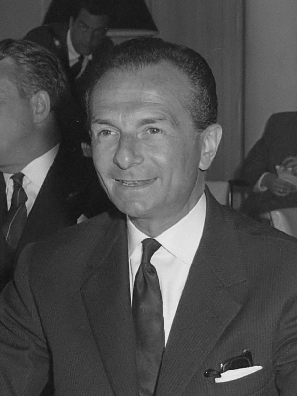 Carnegieheldenfonds 50 jaar. Mr. Klaasesz en minister Gilson 26 juni 1961